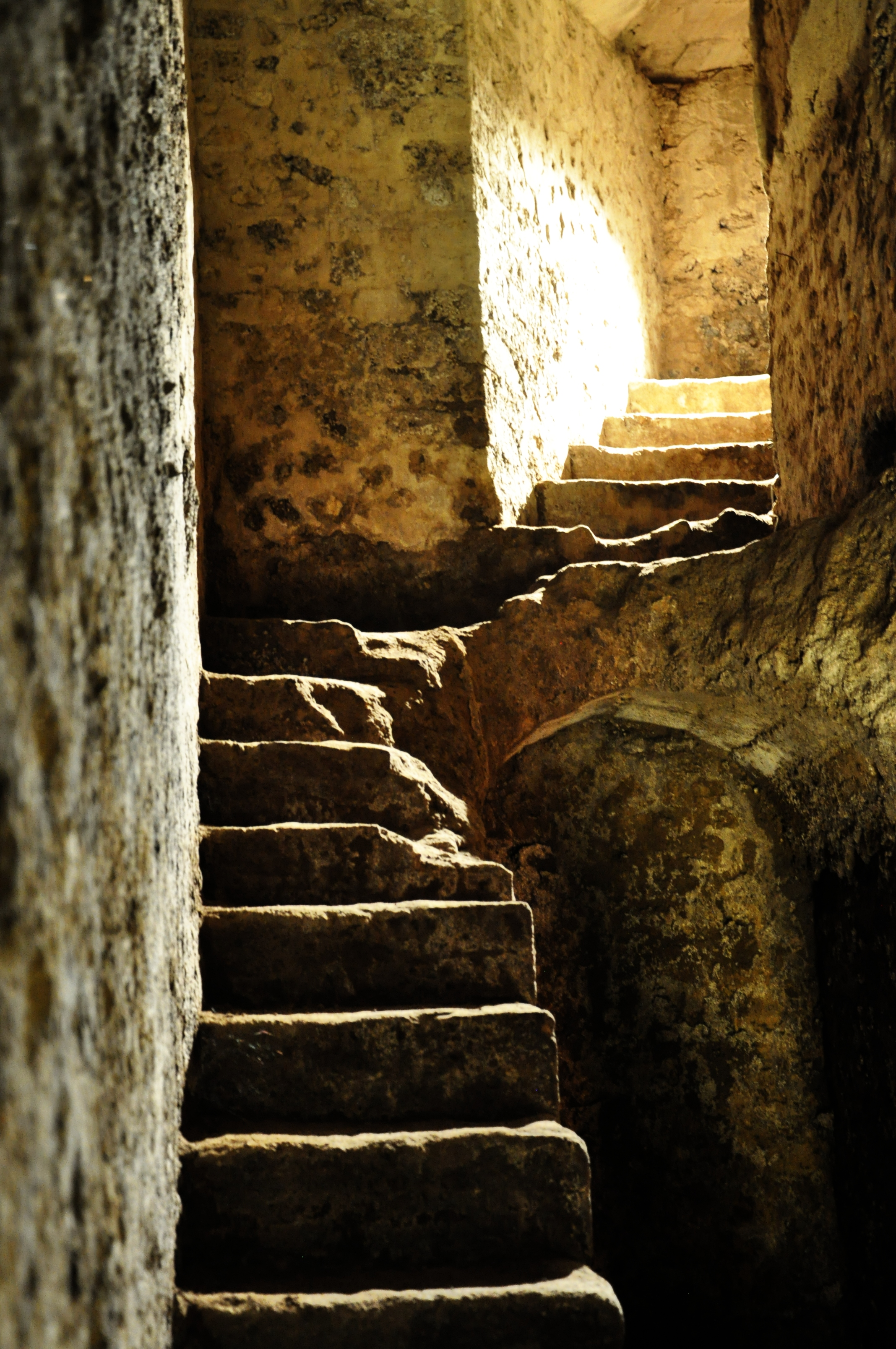 Villa romana di Minori - MIBAC This is a photo of a monument which is part of cultural heritage of Italy.